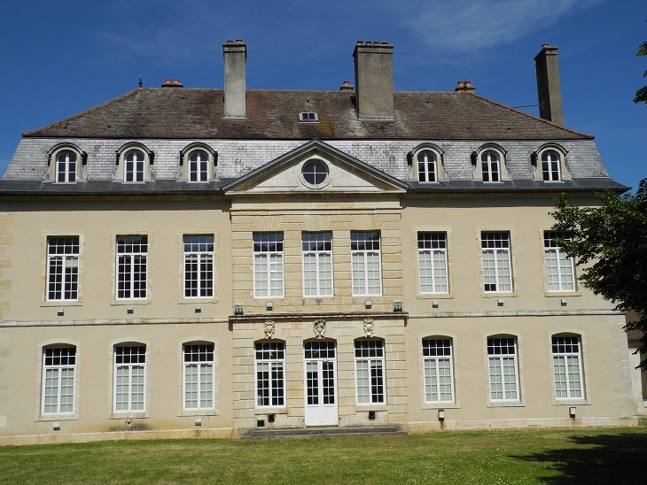 Façade ouest du château de Genlis, côté jardin.